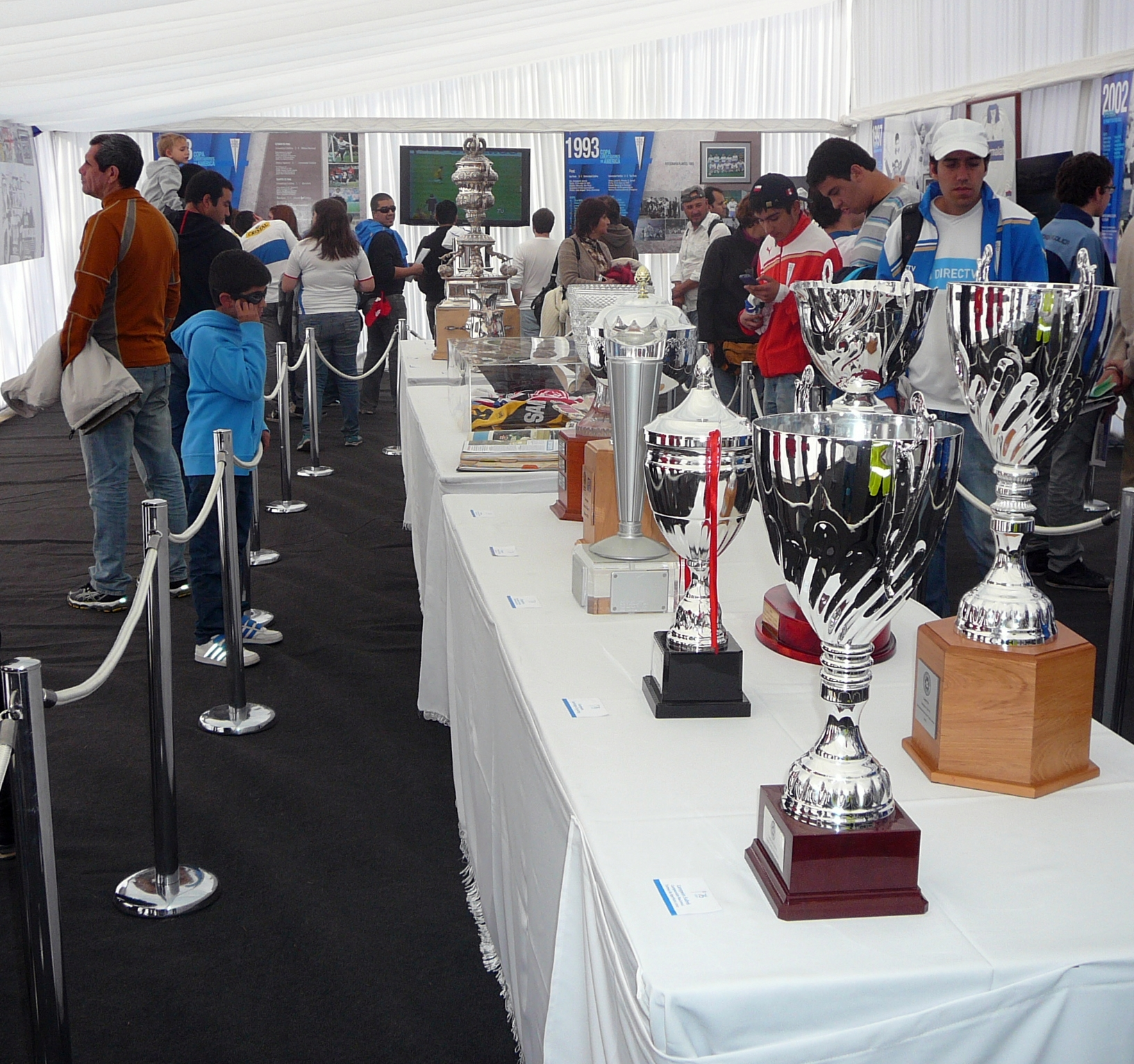 Museo Universidad Católica Aniversario 76